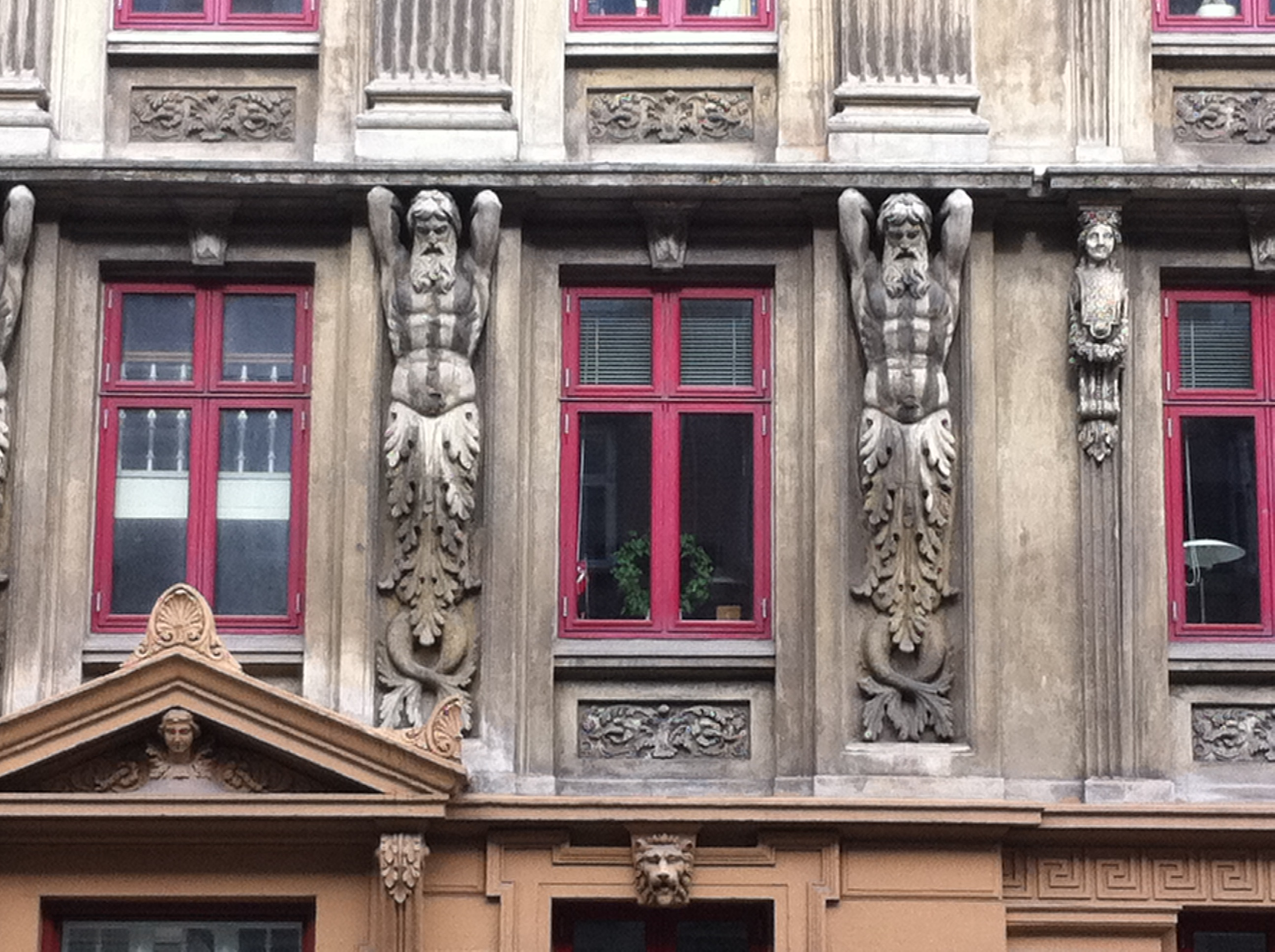 Gothersgade - facade detail